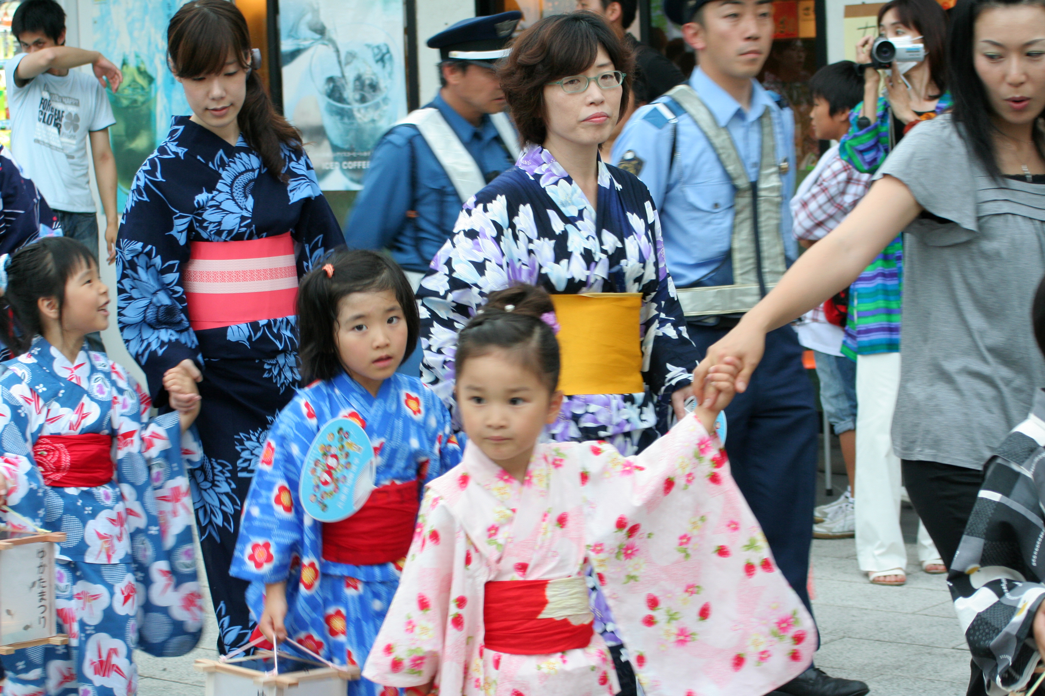 2009年6月22日から23日にかけて、姫路市大手前通りにて開催された「姫路ゆかた祭」。2つ日間にかけて行なわれた祭の風景。注意:ファイル番号及び日時は撮影時系列純にはなっておりません。また、性別、年齢、国籍などによる分類は推定で行なっております。 パレードに参加中の親子。